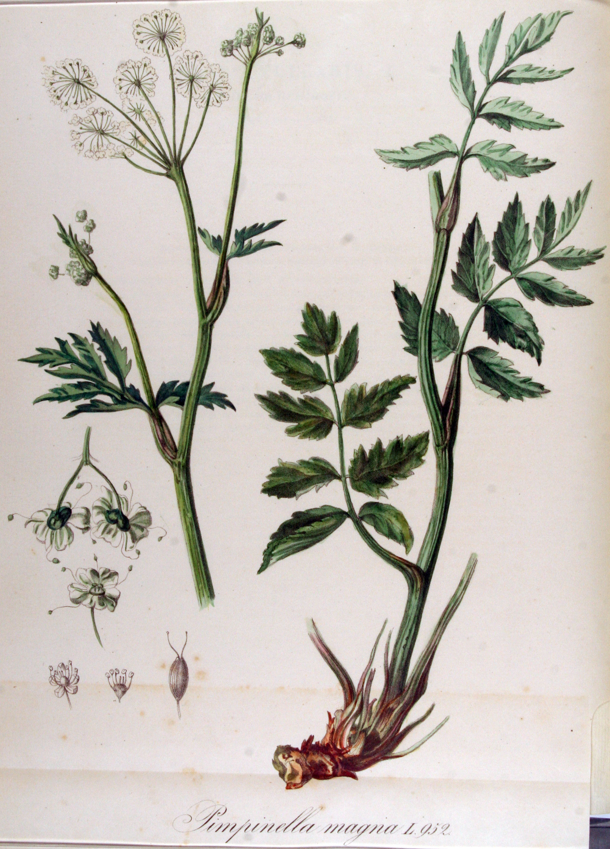 Pimpinella major (L.) Huds. (Syn. Pimpinella magna L.)